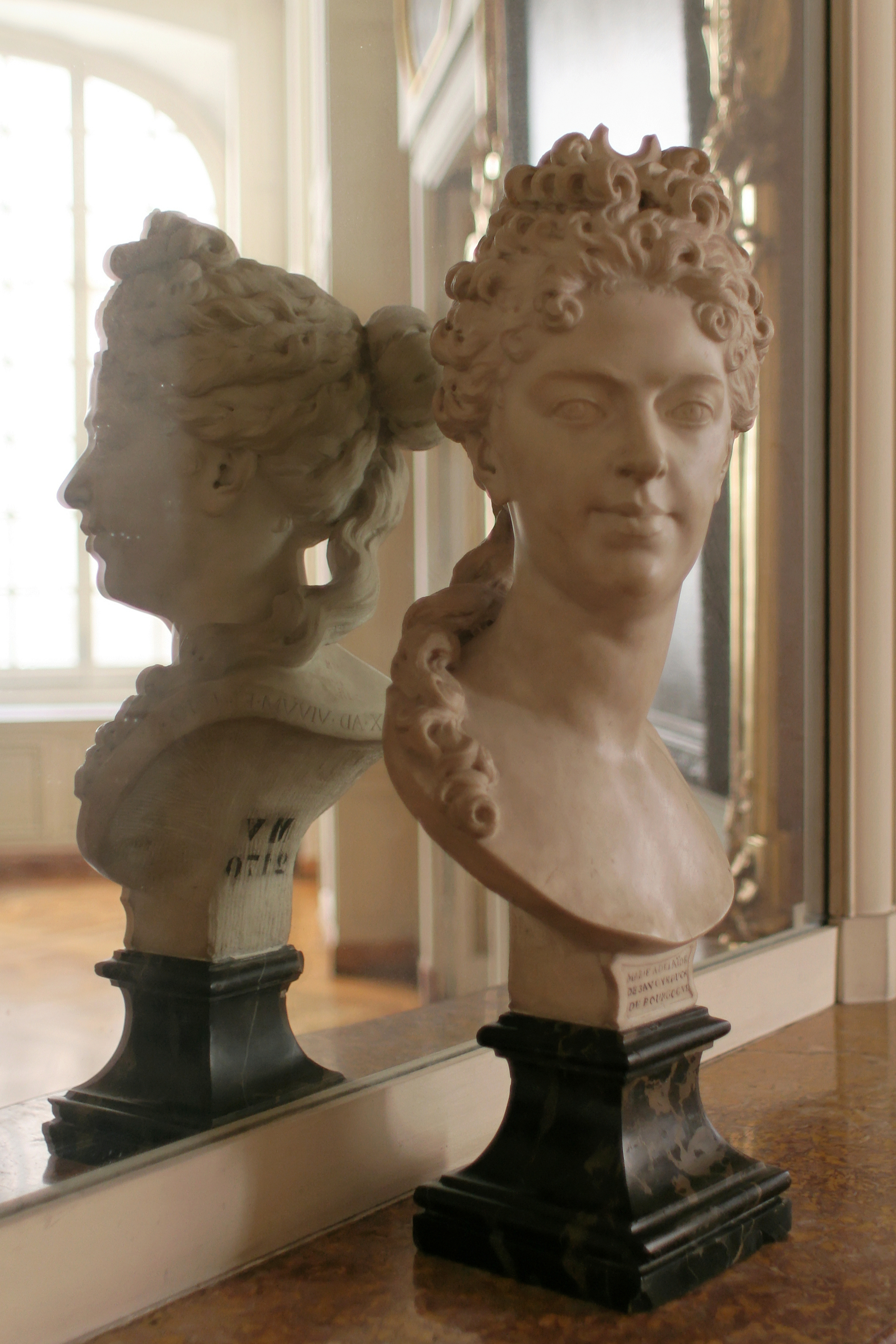 Château de Versailles, appartements du Dauphin et de la Dauphine, première antichambre du Dauphin. Buste de Marie-Adélaïde de Savoie duchesse de Bourgogne, mère de Louis XV, par Antoine Coysevox, 1710, marbre. Numéro d'inventaire MV 2170, porté au dos. hauteur : 0,7 m.